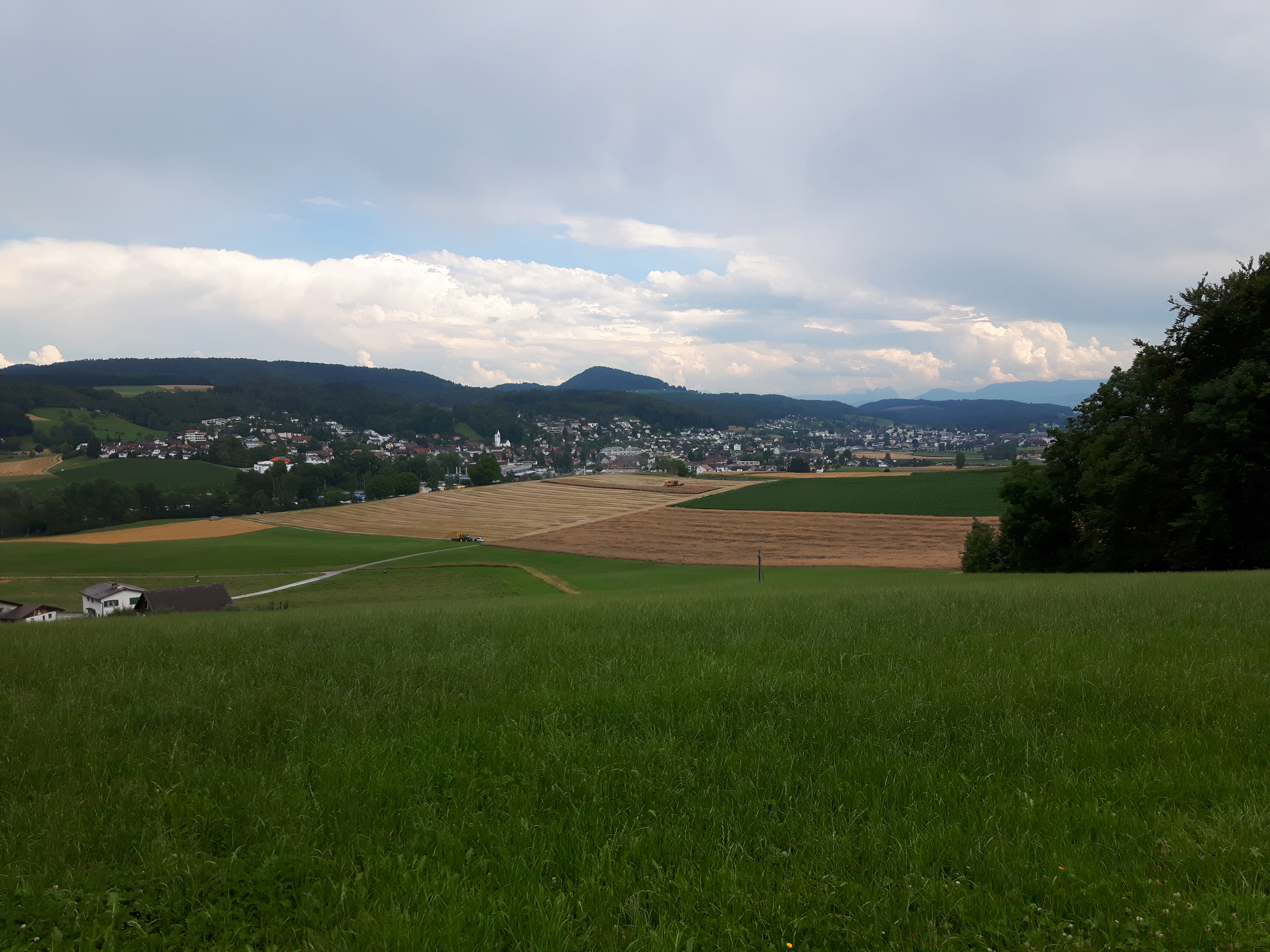 Blick von der Rütelimatten nach Hedingen und Affoltern am Albis, Kanton Zürich